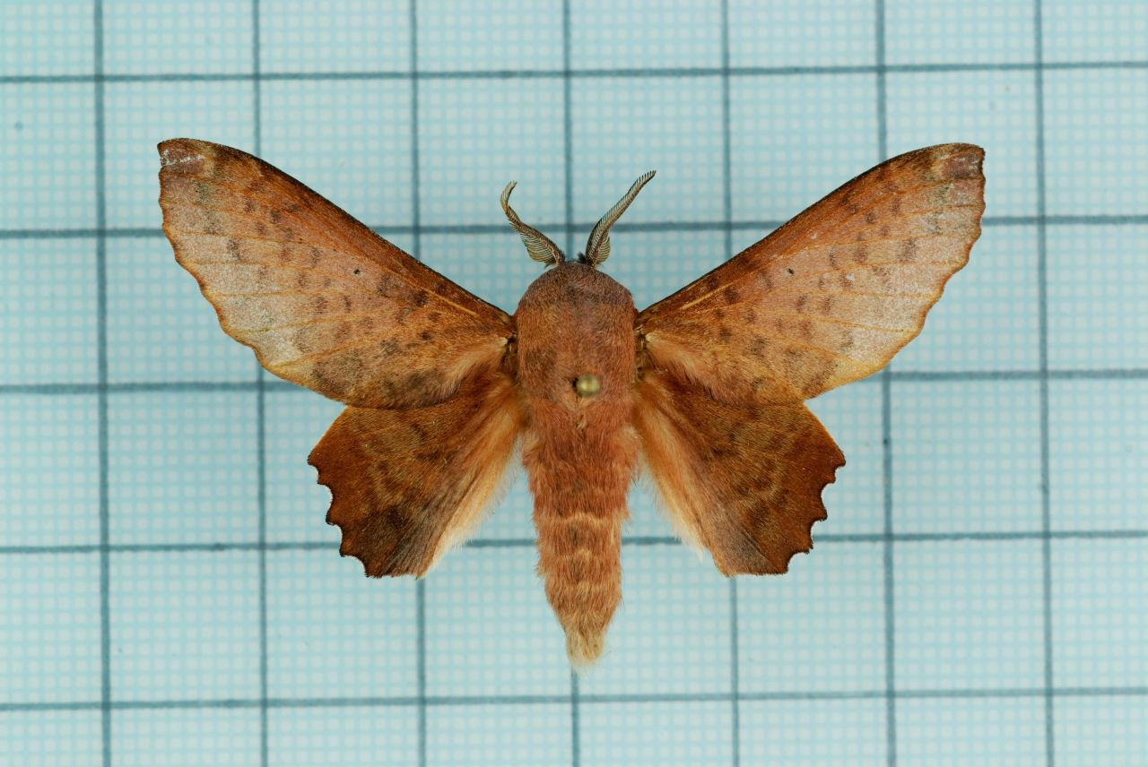 Paradoxopla sinuata taiwana (Wileman,1915) 台灣枯葉蛾 鞍2:p.59,pl.40-8 female